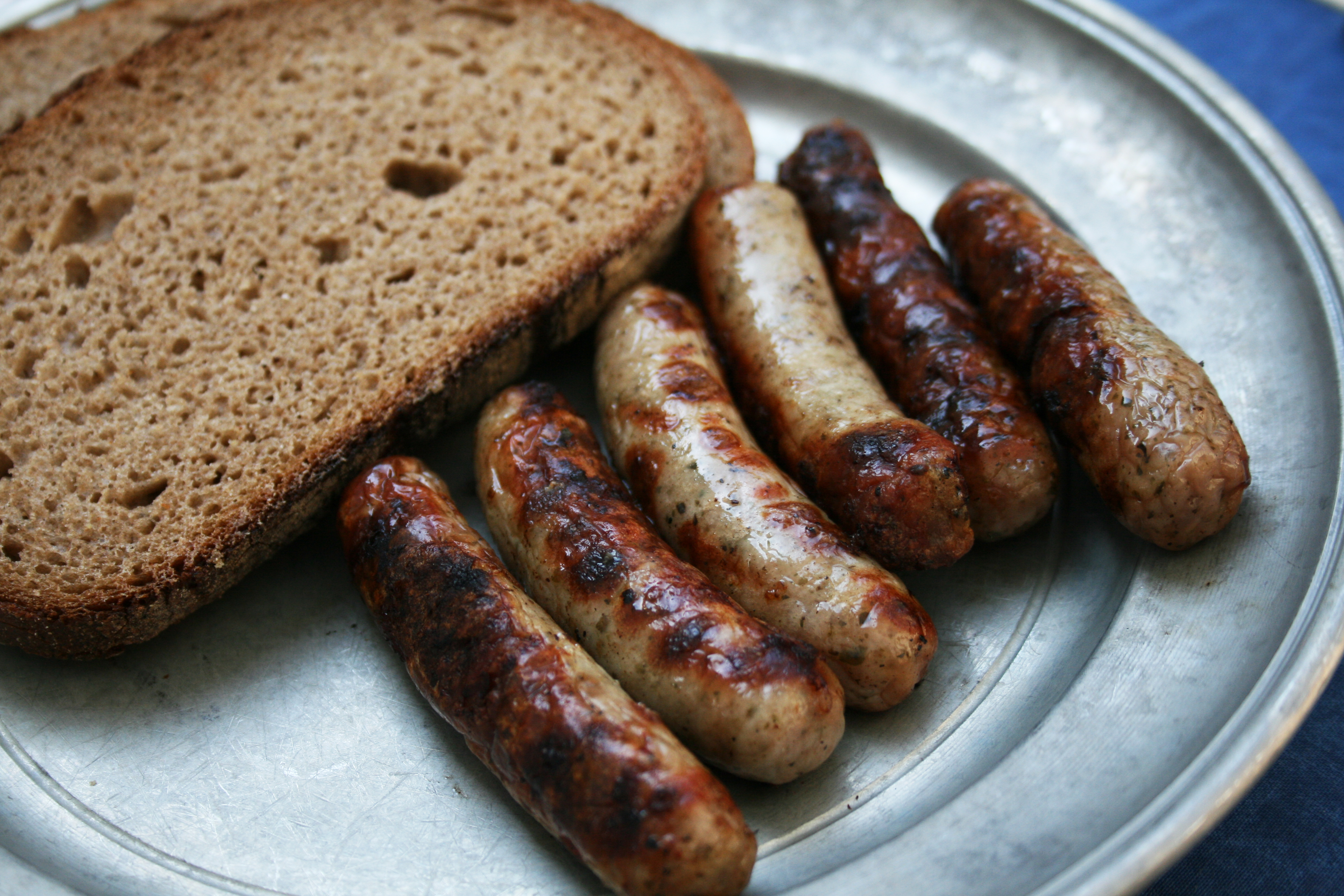 6 Nürnberger